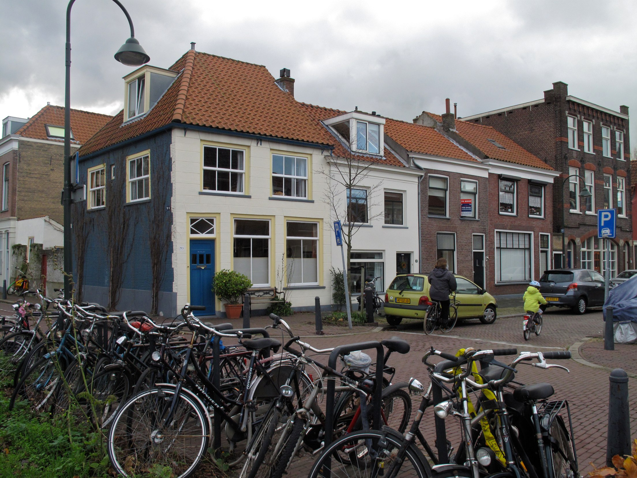 quartier à 30